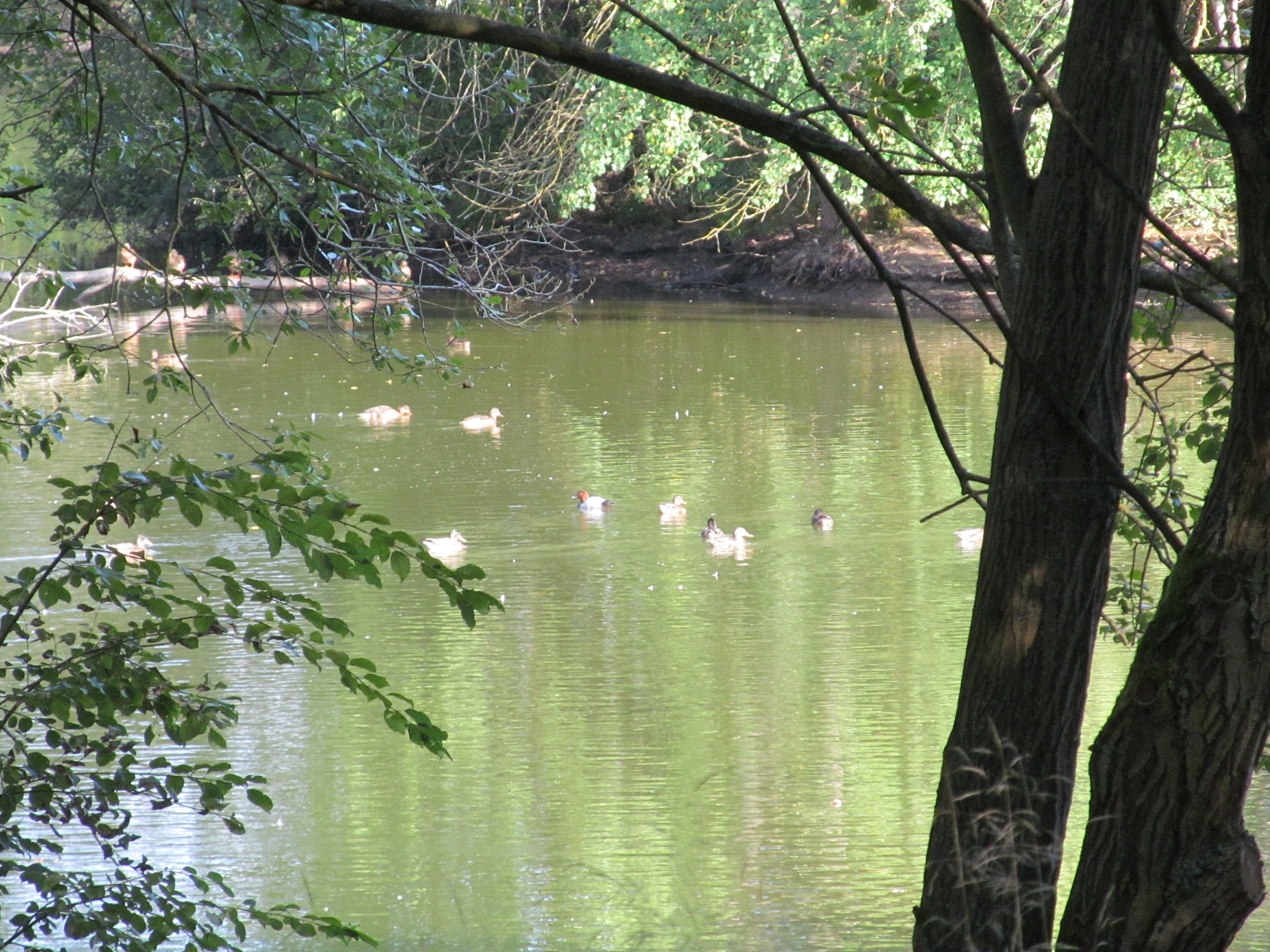 Blick vom westlichen Randweg auf den Borkener See